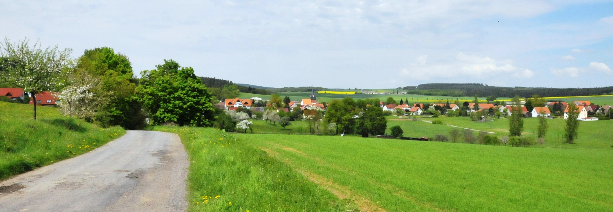 Rippershausen